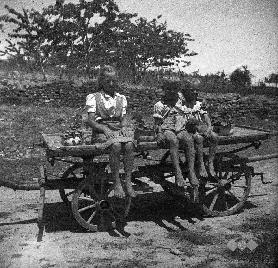 Otroci družine Merlini, Rojci.